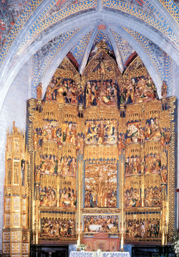 Arrigorriagako Arteko Andrea Mariaren erretaula nagusia